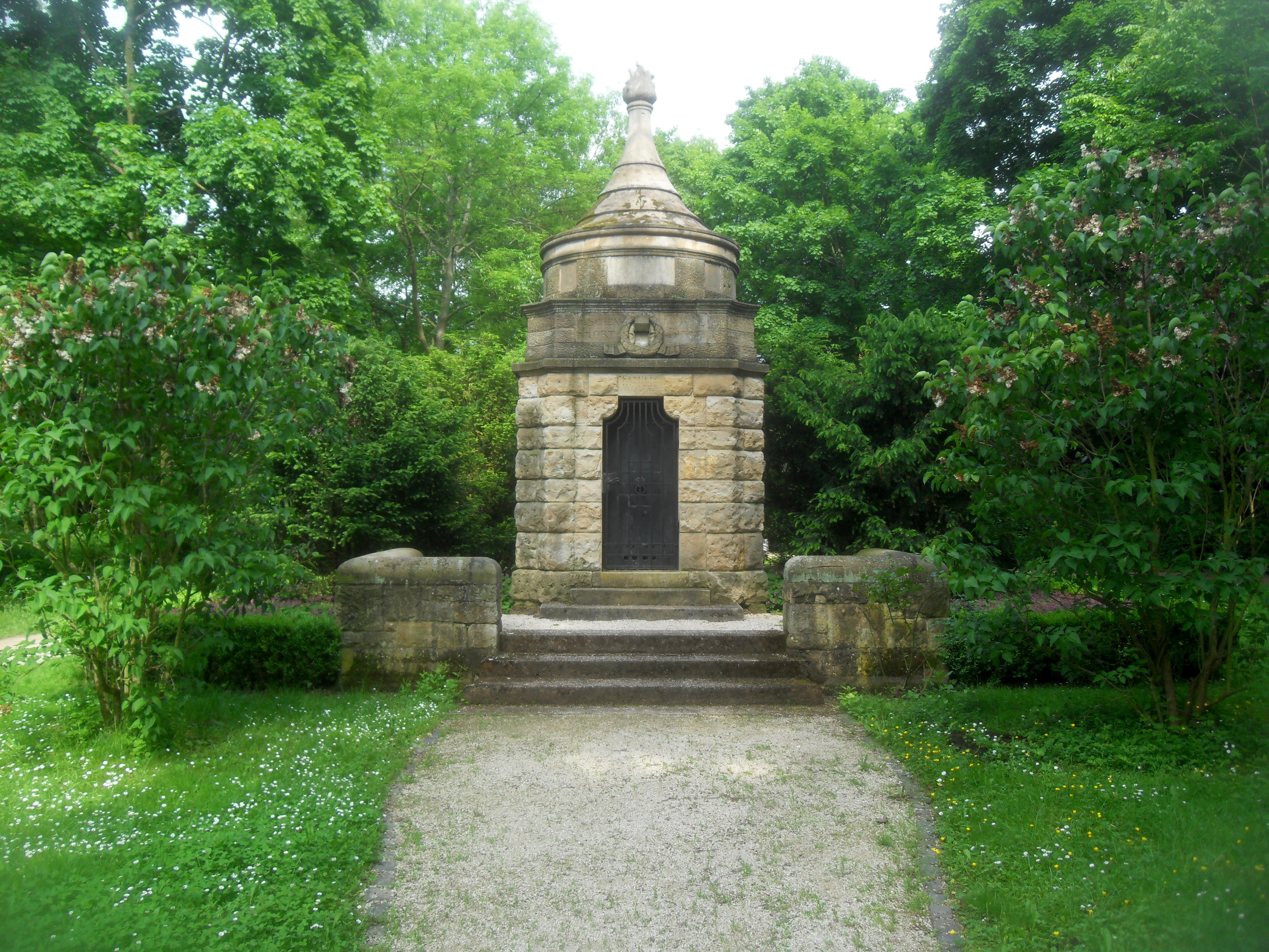 Das als Rundtempel gestaltete Monument im Karl-Bittel-Park in Worms in Rheinhessen in Rheinland-Pfalz (Deutschland), das von Karl Bittel für sich und seine Familie als Urnengrabstätte errichtet wurde